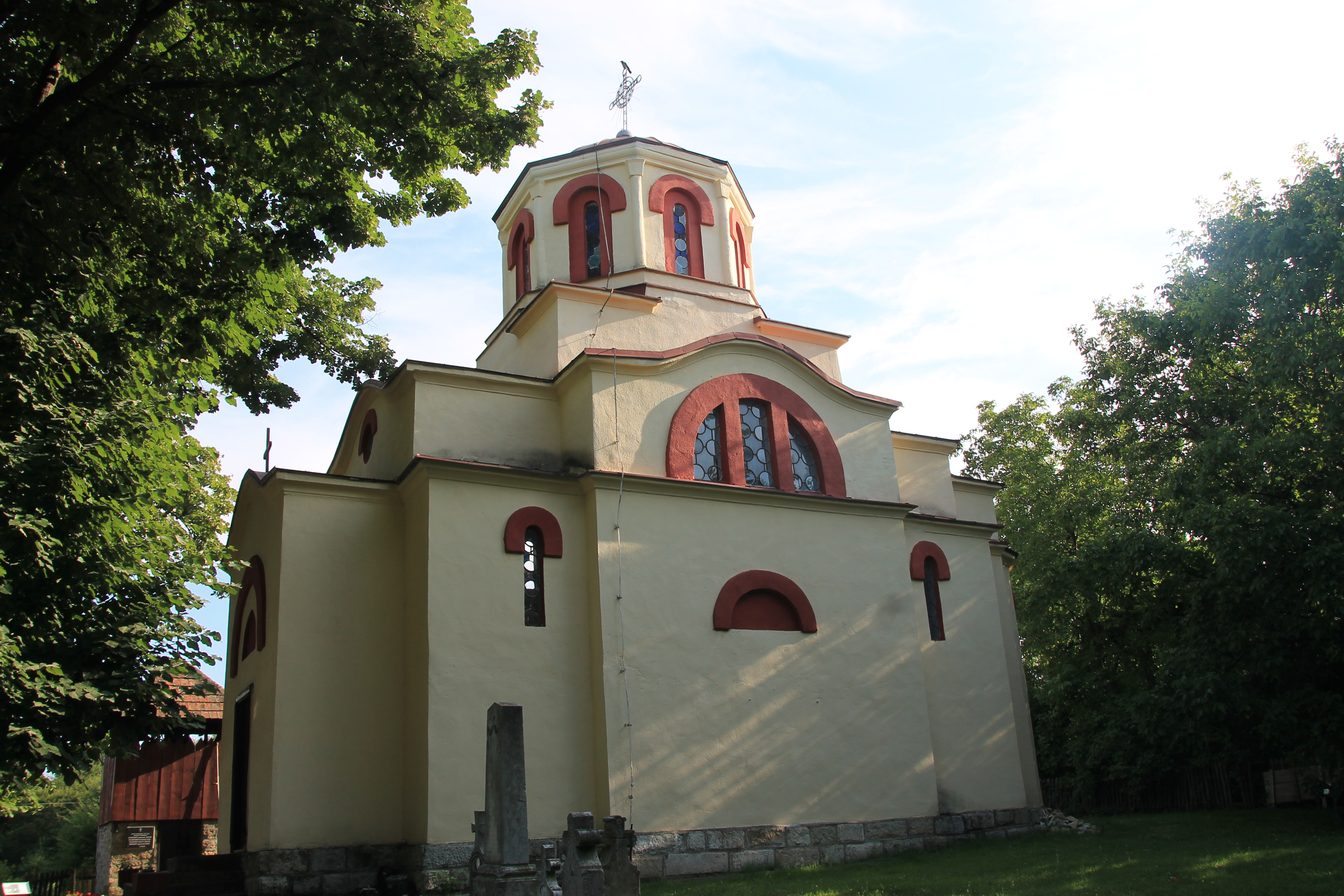 Crkva Sv. Marka (Stojnik)